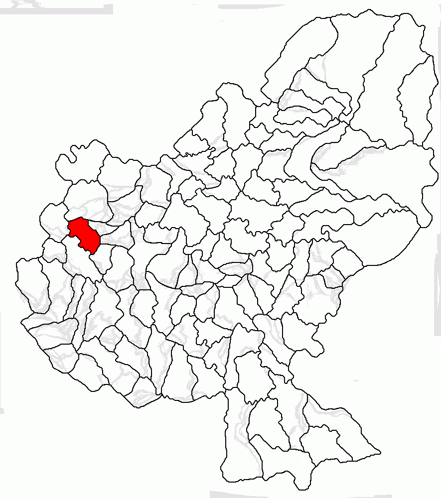 Categorie:Hărţi ale judeţului Mureş